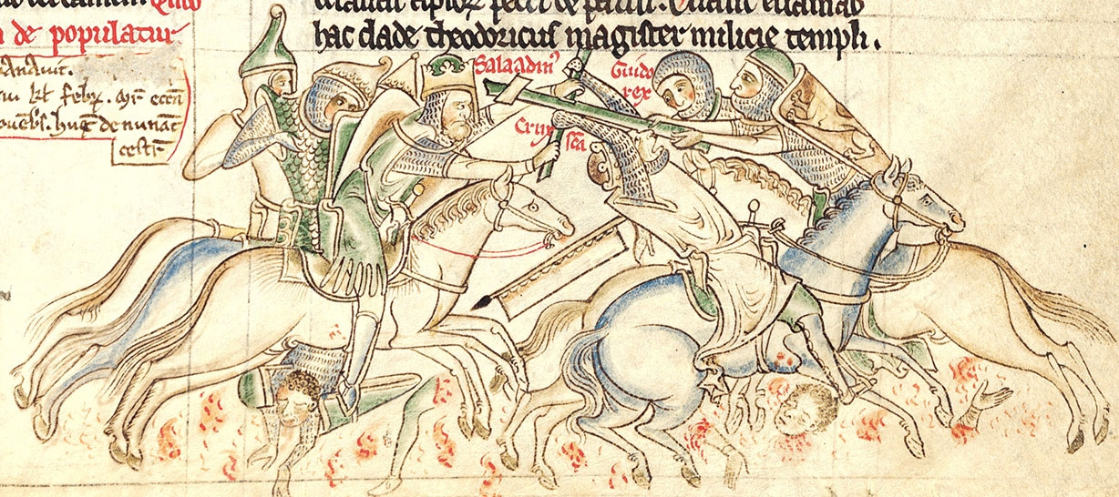 Saladin